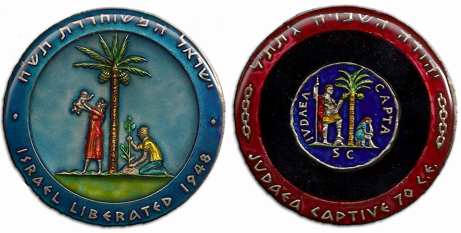 מדליית שחרור דור ג' - צביעת יד